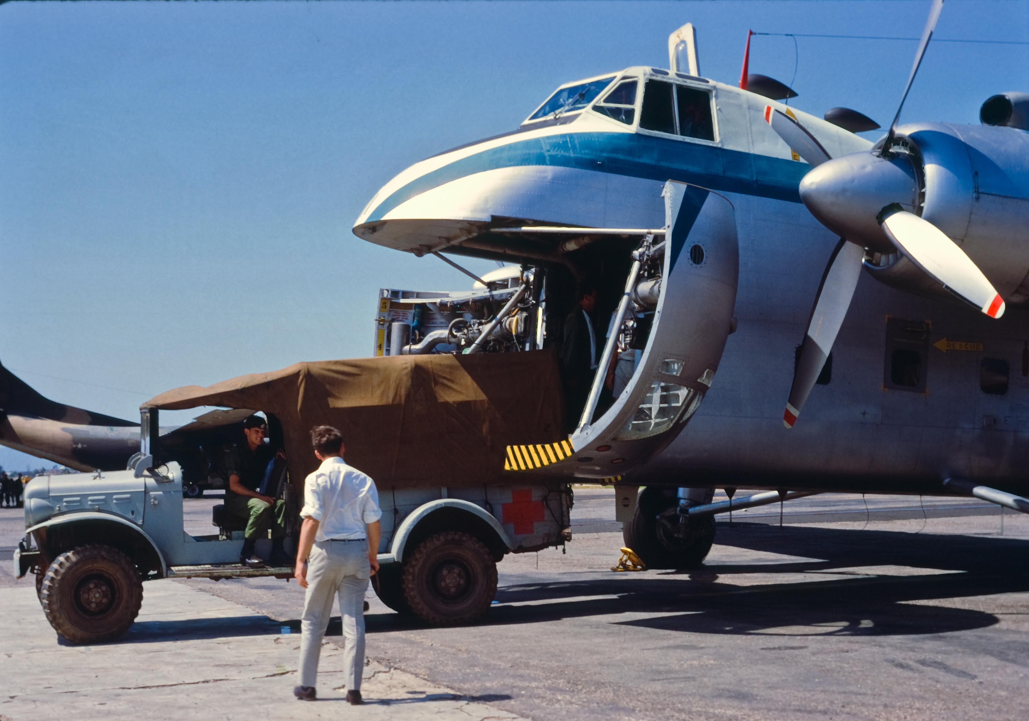 1969-Chiếc xe tải từ Bồng Sơn xuống để lấy thư của họ.Pete Stitt trong xe tải 3/4 tấn. Tôi nghĩ đó là ngày đầu tiên của Pete ở Qui Nhơn.